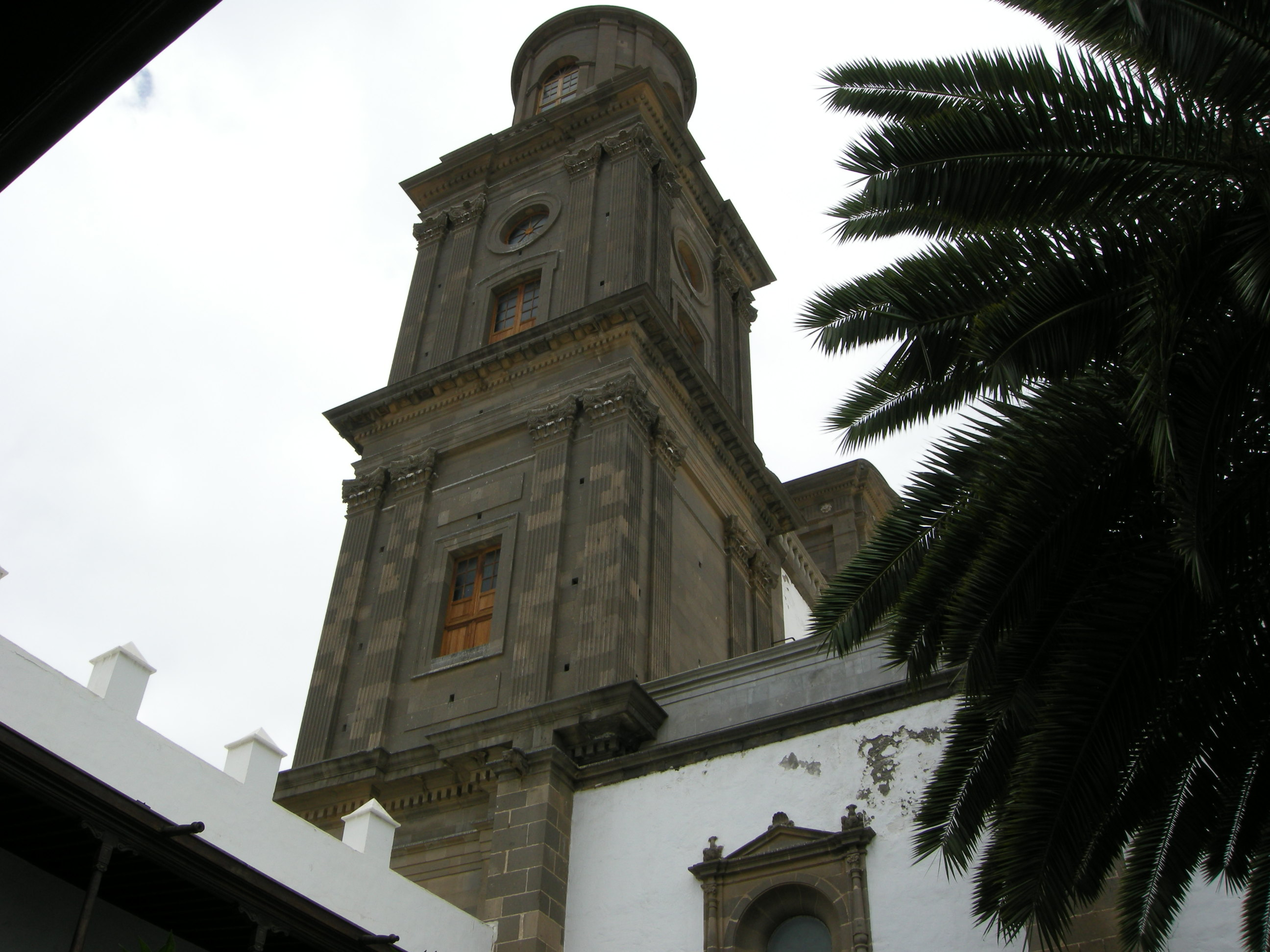 Patio degli aranci